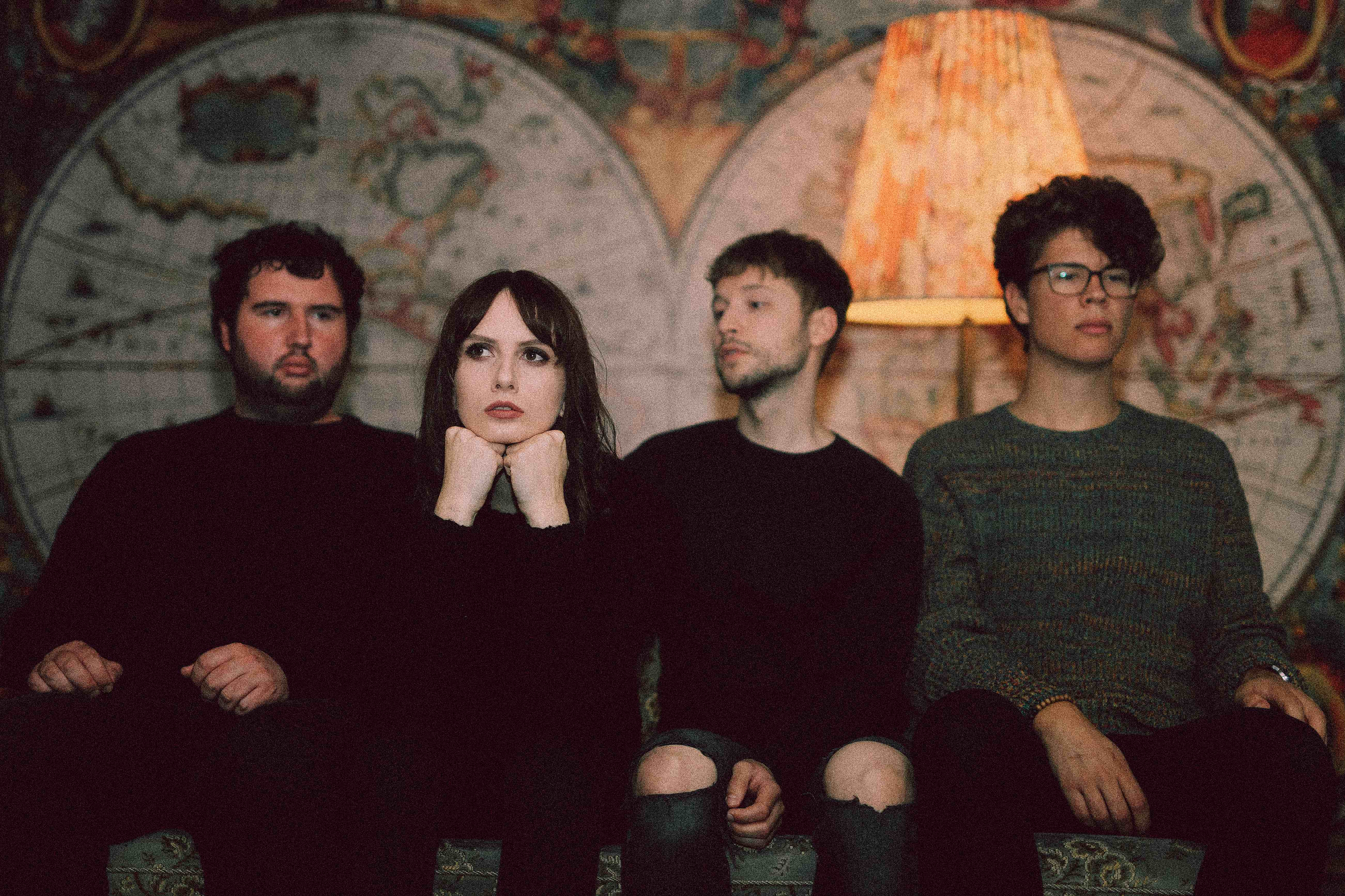 Die aktuelle Besetzung von Nick & June (von links nach rechts): Helleken, Kraft, Wolf, Noka